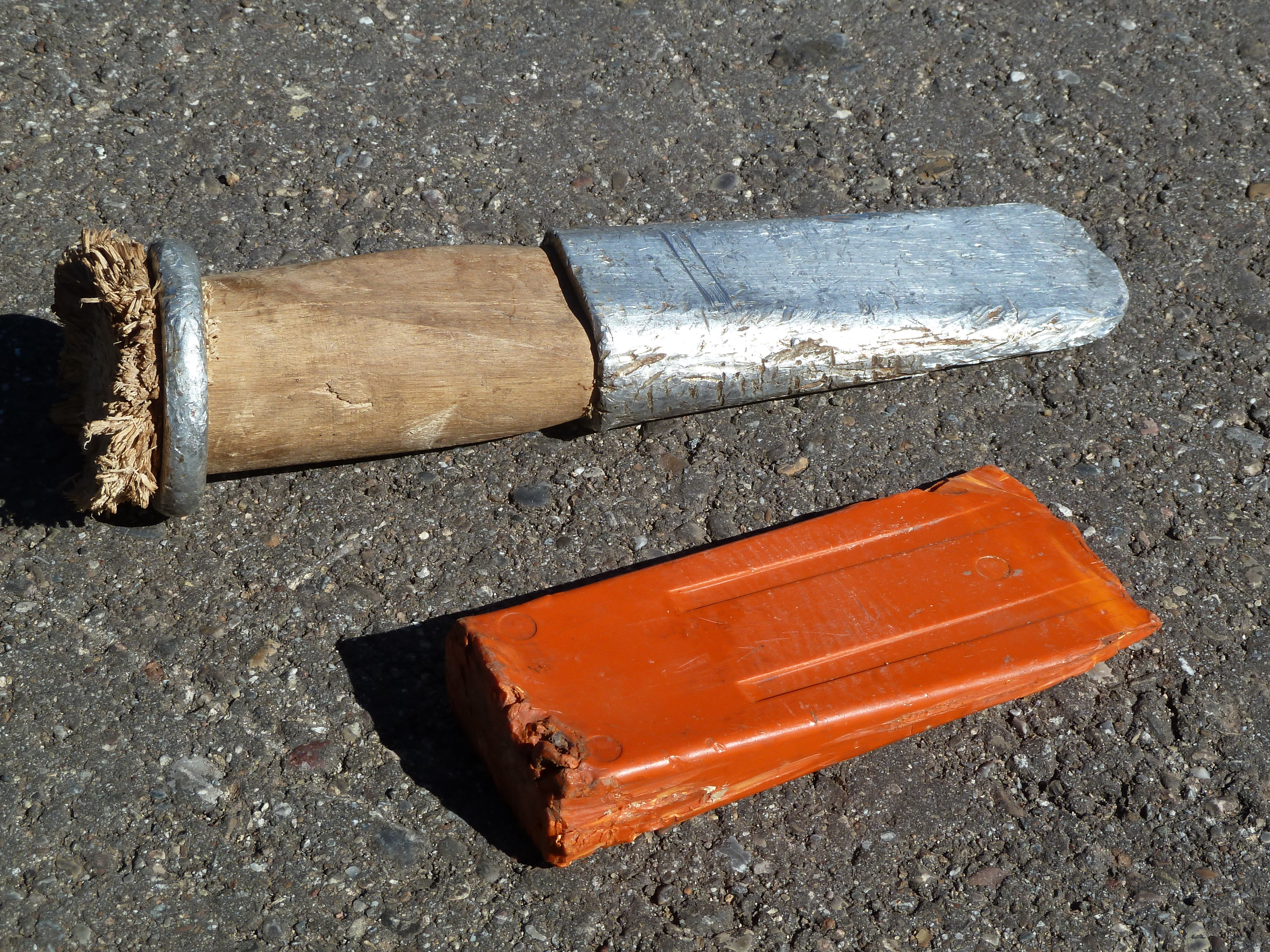 Spaltkeile